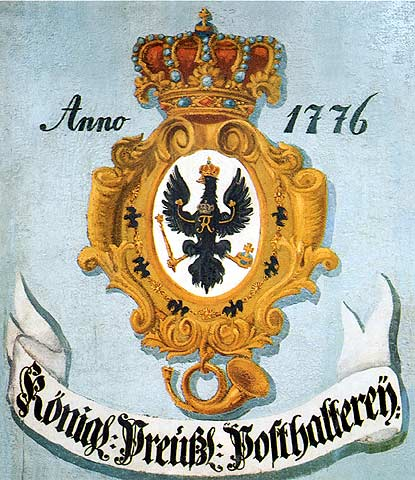 Фирменная вывеска Прусской почты из Галле (Заале). Оригинал находится в музее федеральной почты во Франкфурте-на-Майне.